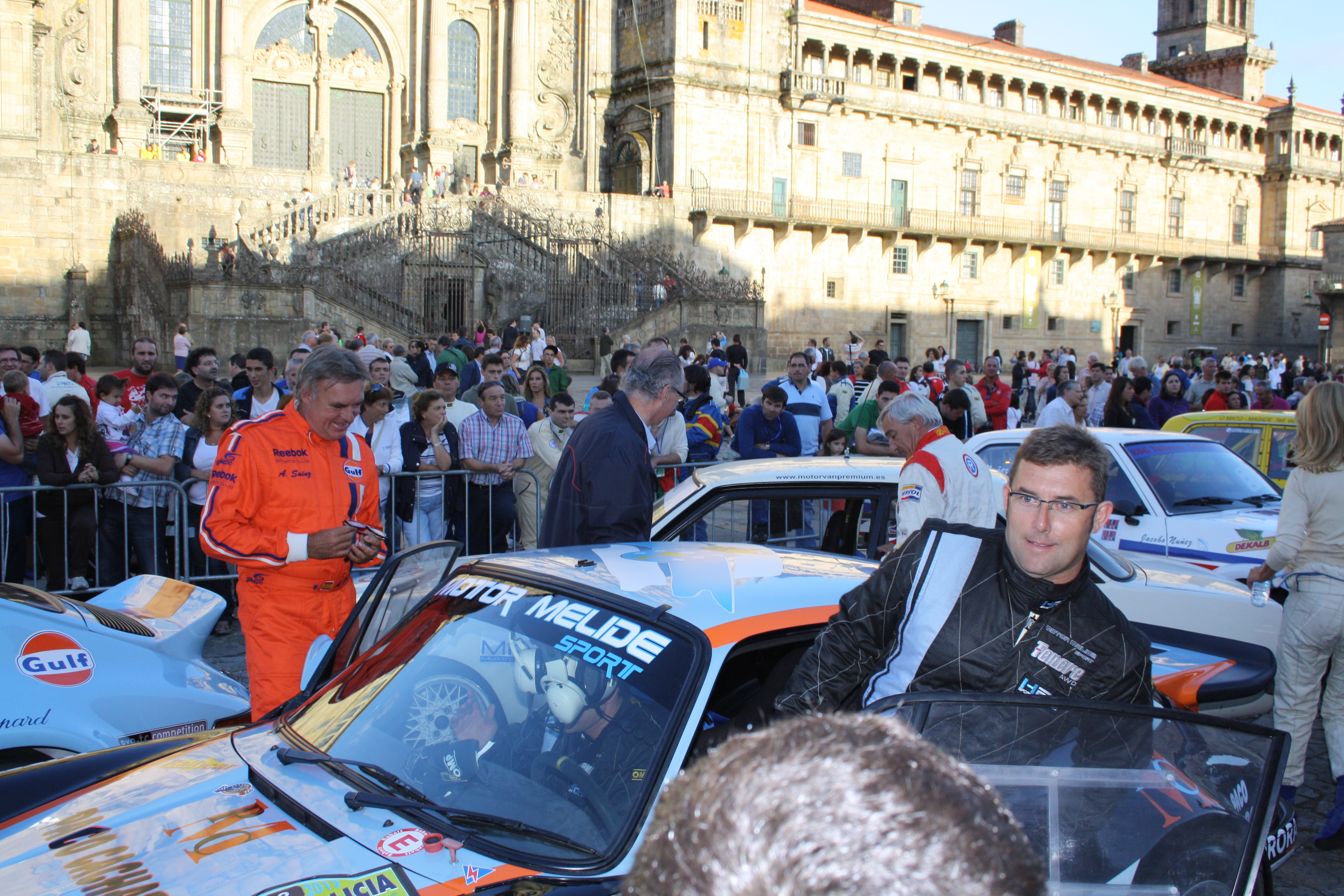 Antonio Sainz y Jesus Ferreiro en 2012.